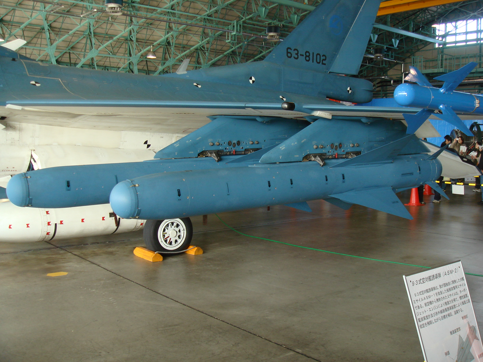 航空自衛隊 93式空対艦誘導弾 ダミー弾（青）。2008年11月30日 航空自衛隊岐阜基地にて。